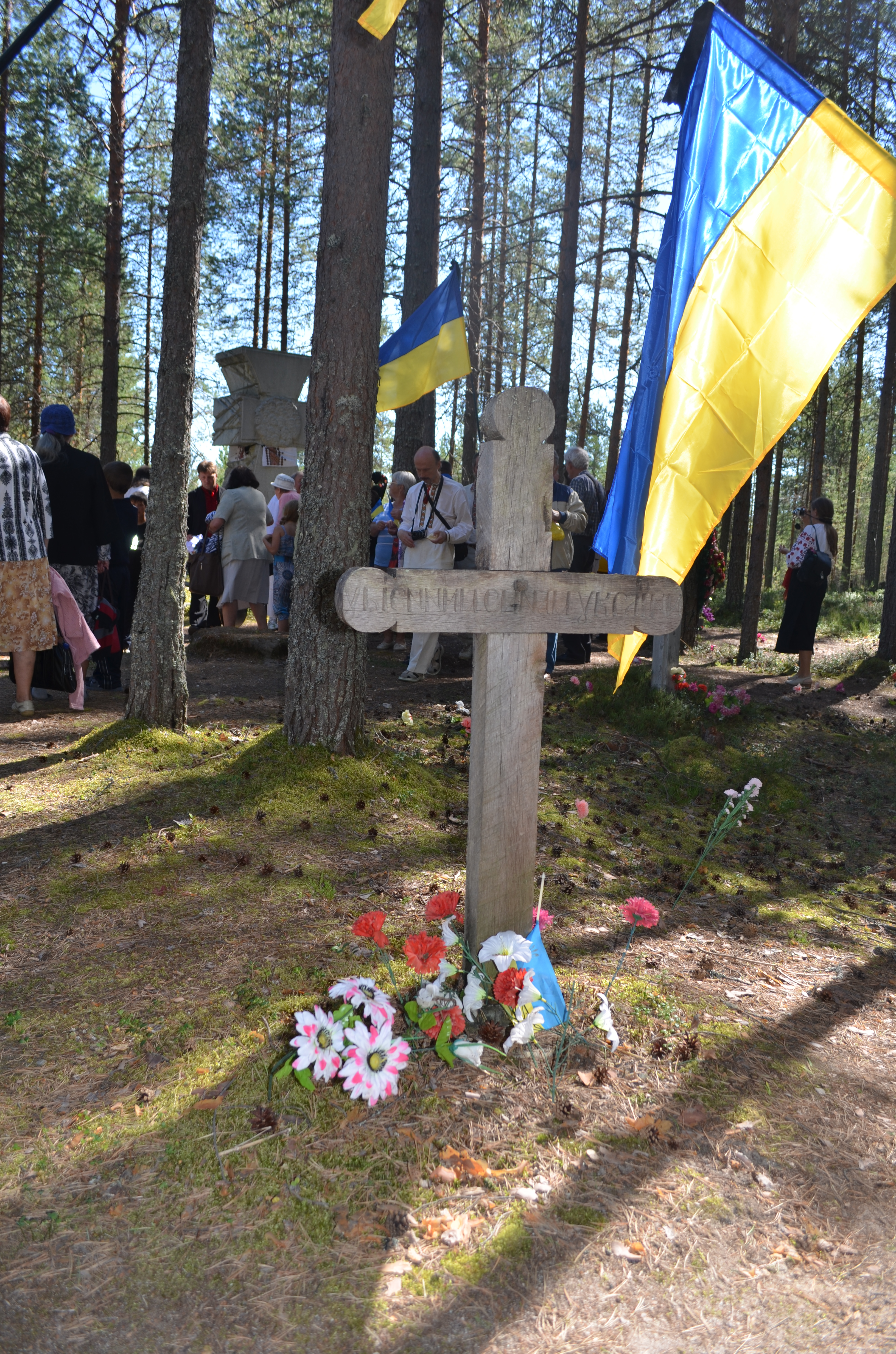 Урочище Сандармох. Дні пам’яті. Пам’ятник загиблим українцям (дерев’яний козацький хрест)